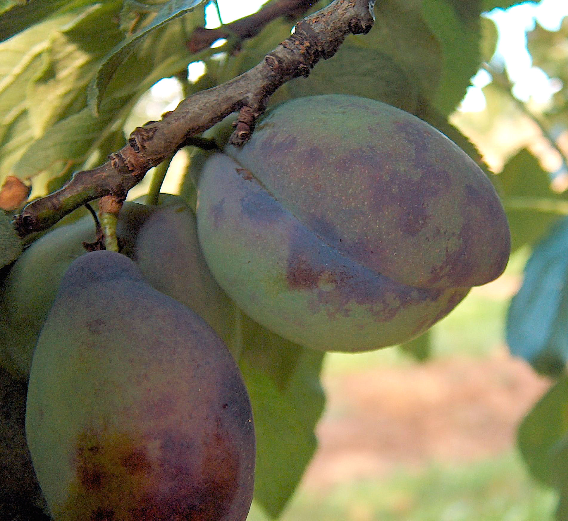 Fruchtsymptome (Marmorierung der Frucht) der Scharka